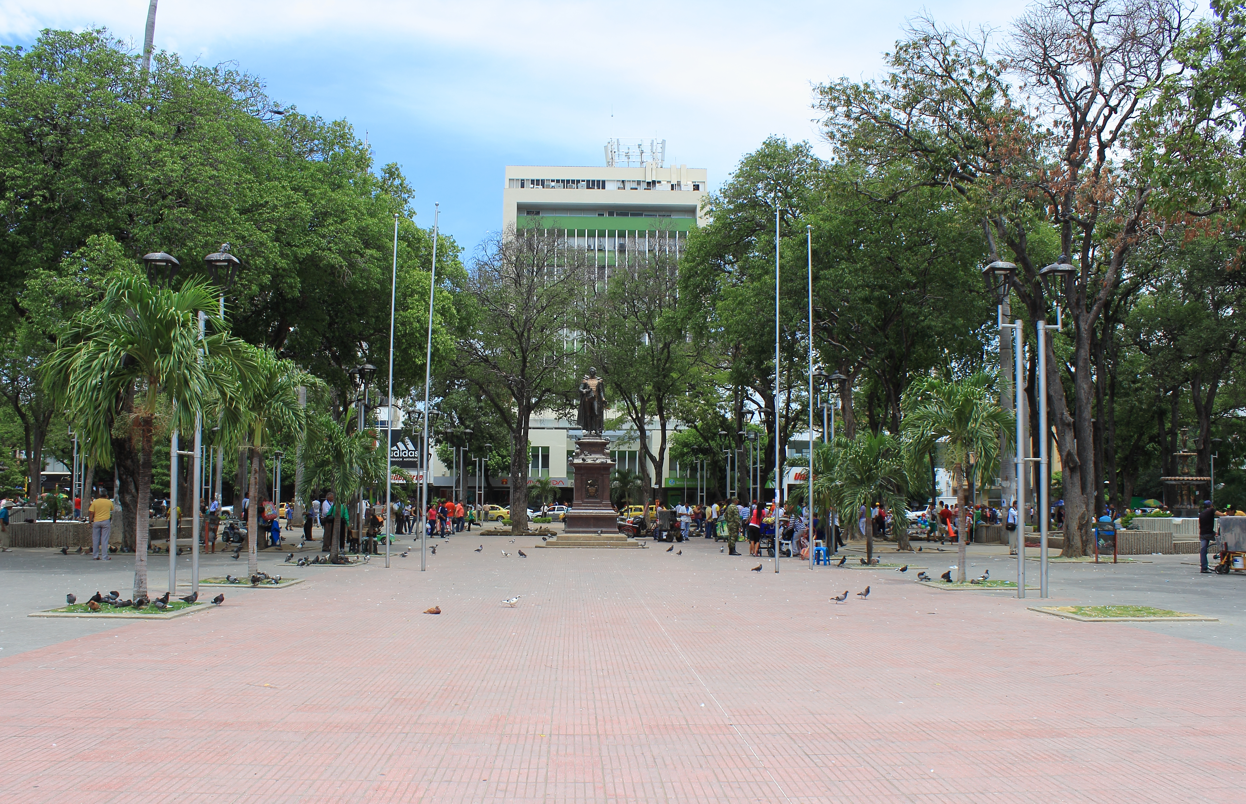 Parque Santander ubicado entre la avenida 5 y 6 entre las calles 10 y 11 frente a la Gobernación y la Catedral de San jose